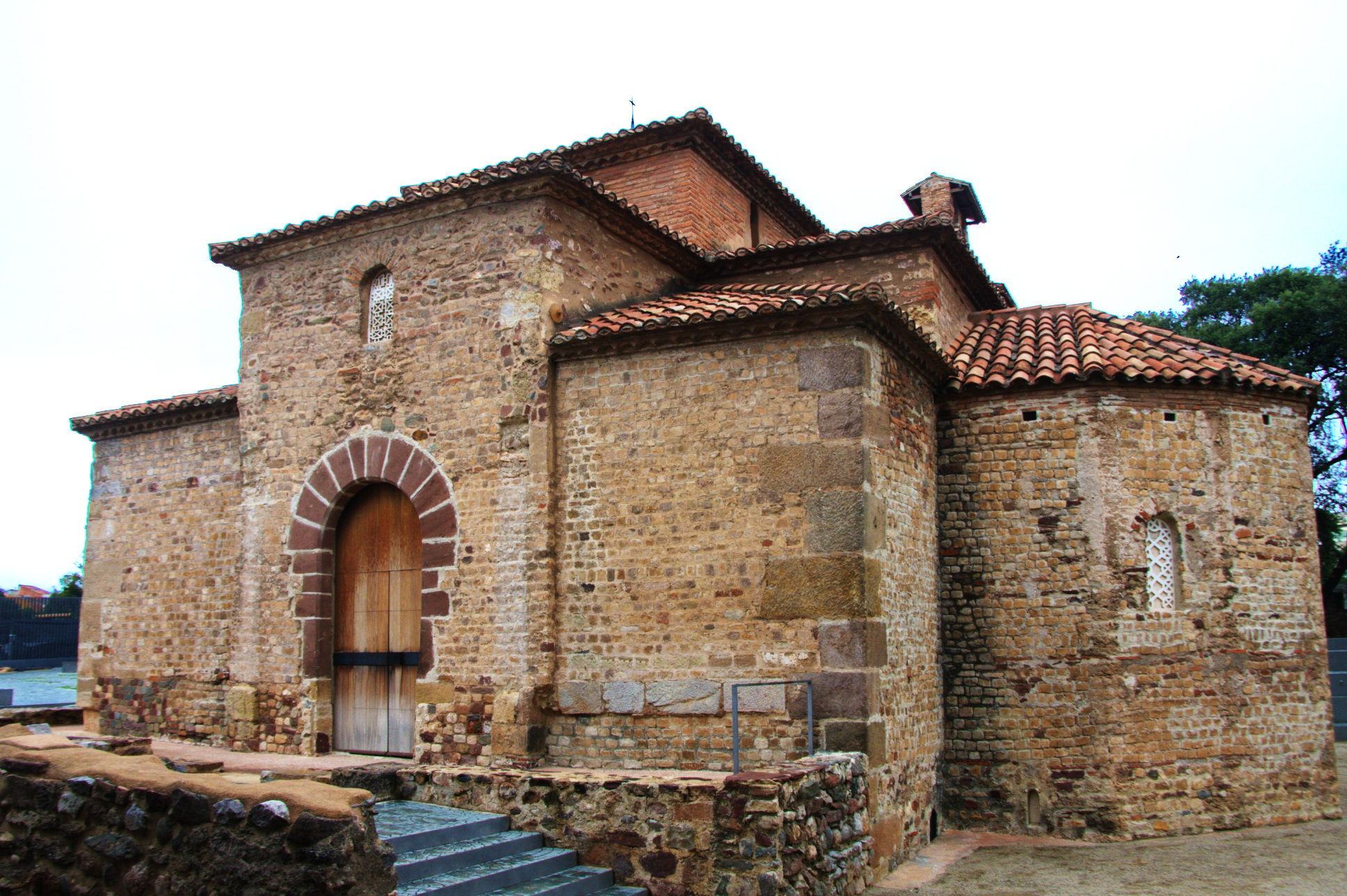 Església de Sant Miquel (Terrassa)